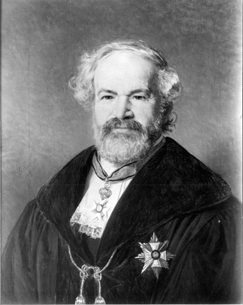 Gustav Rümelin, gemalt von Roland Risse